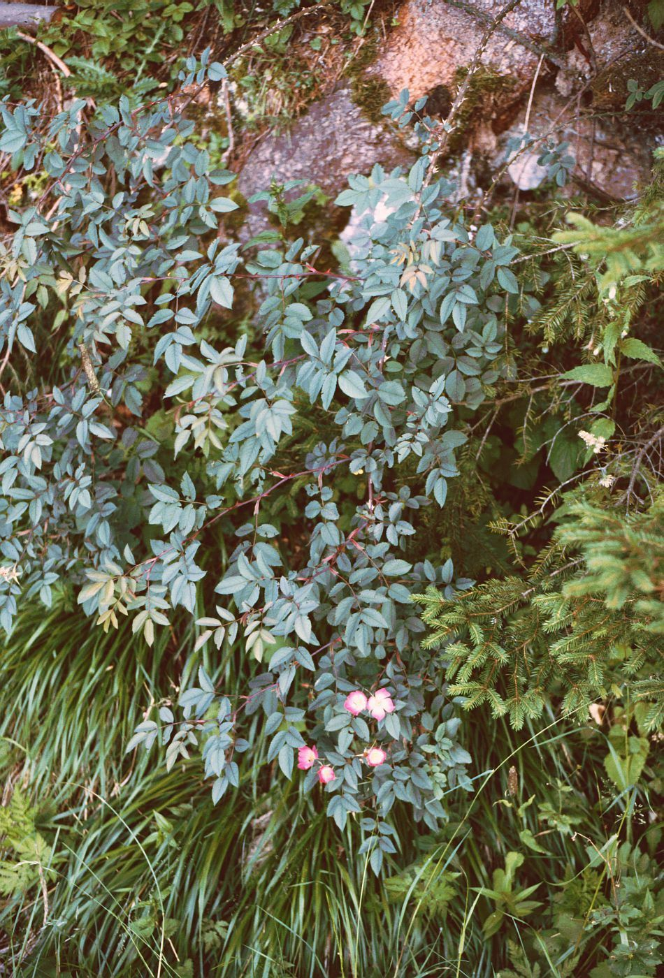 Rotblatt-Rose (Rosa glauca Pourr.), Rosengewächse (Rosaceae) - Österreich/Austria/Autriche: Kärnten/Carinthia, Karawanken, bei Zell Pfarre/Sele Fara